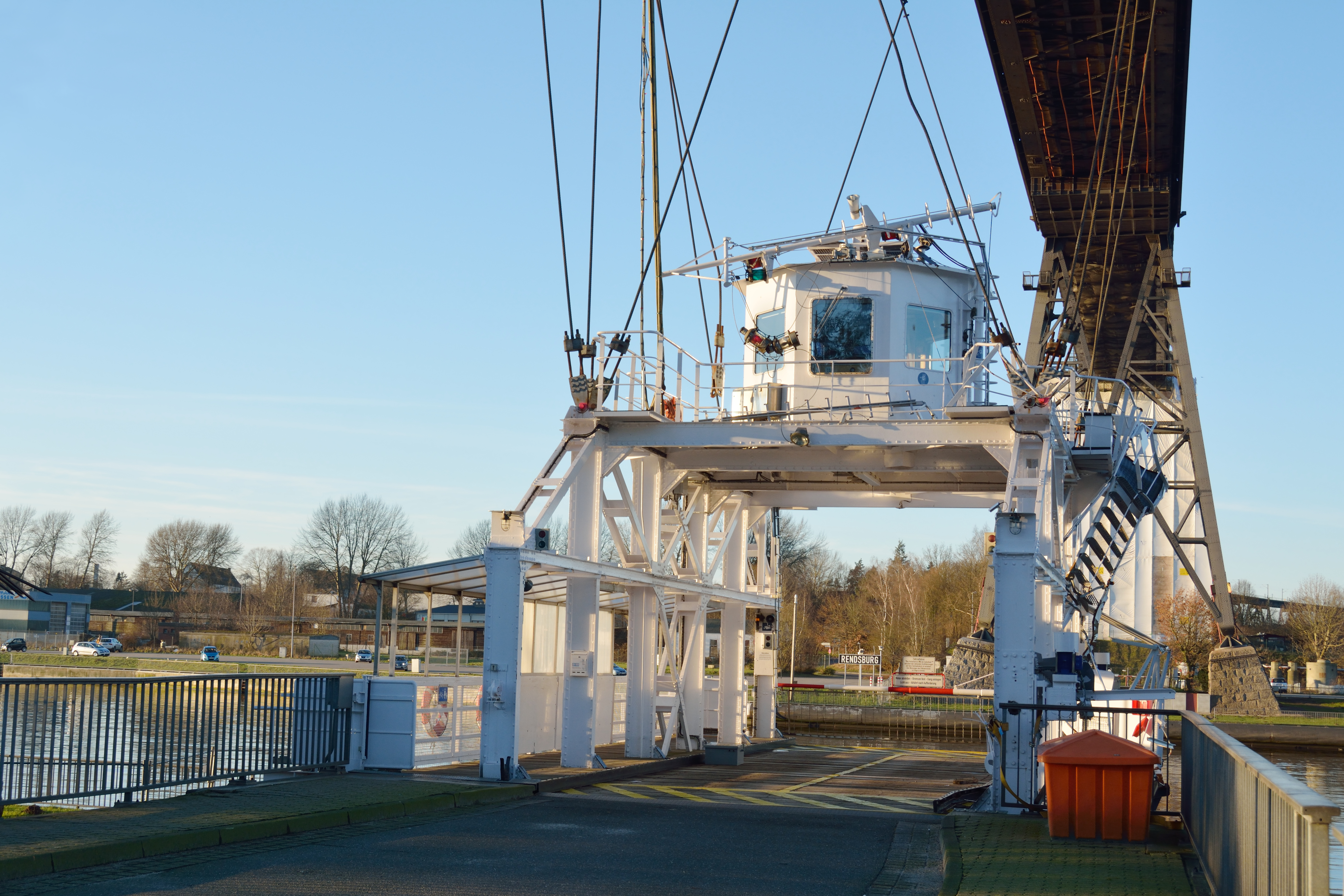 Die Schwebefähre nach dem Unfall am 8. Januar 2016 am Ufer des Nord-Ostsee-Kanals im Februar 2016.